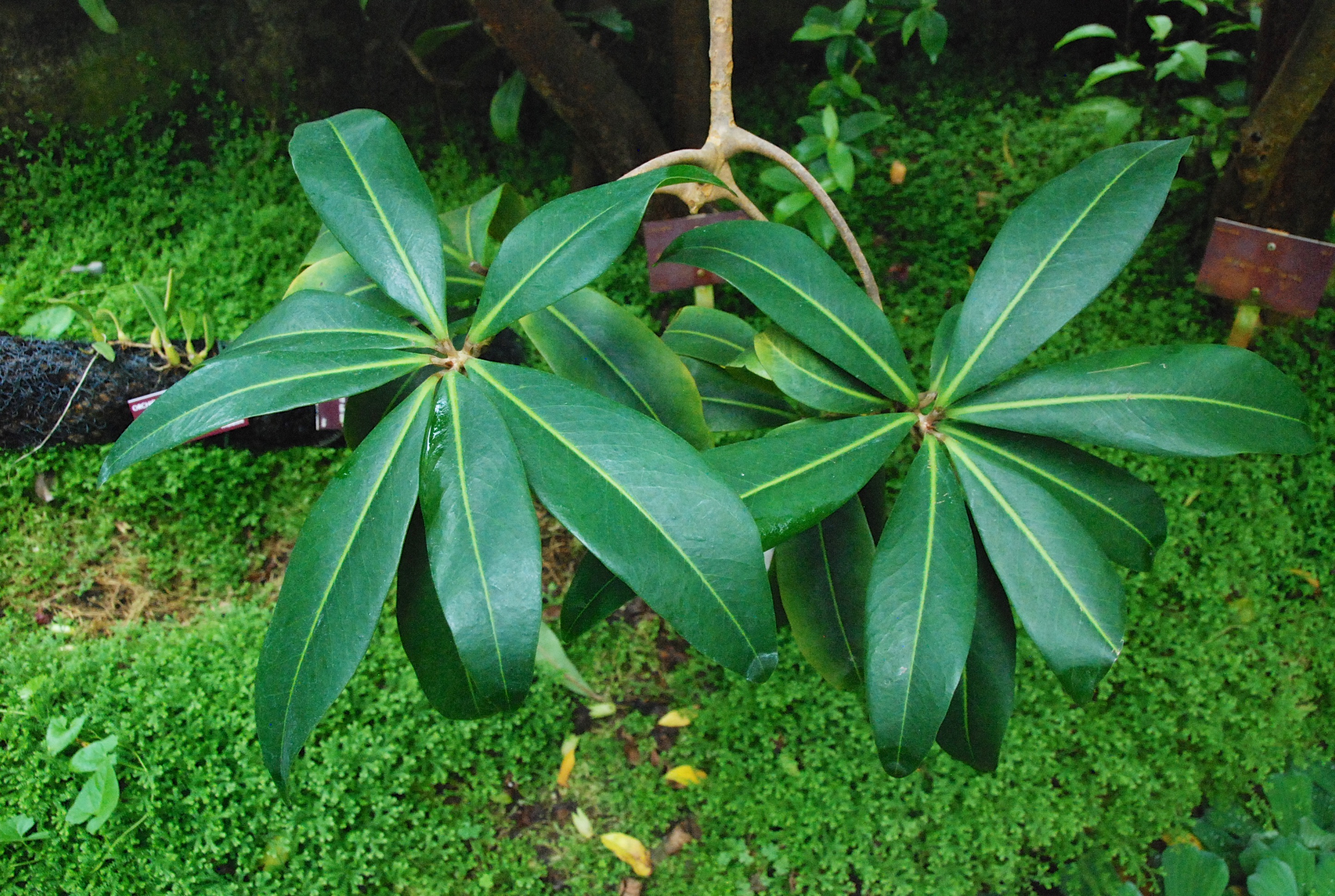 L'espèce "Badula balfouriana" dans les serres tropicales du Conservatoire Botanique National de Brest. Photo prise lors des journées contributives au Conservatoire Botanique National de Brest durant l'été 2015.